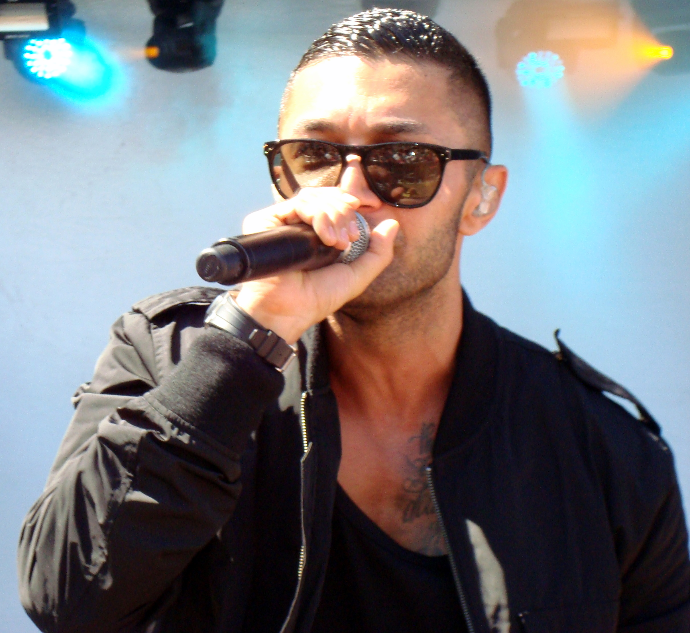 Den danske sanger Burhan G, under en koncert på Skive Festival 2011.